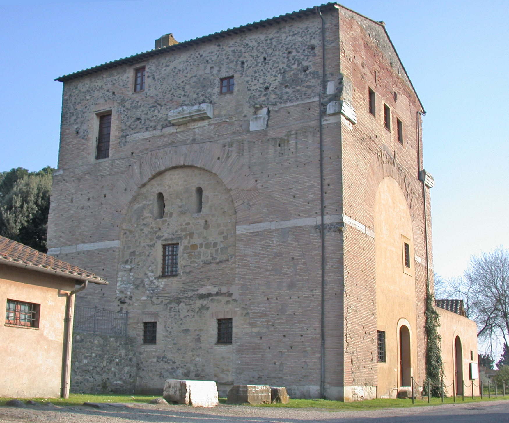 Italia, Regione Lazio, Provincia di Roma, via Flaminia, arco di Malborghetto.